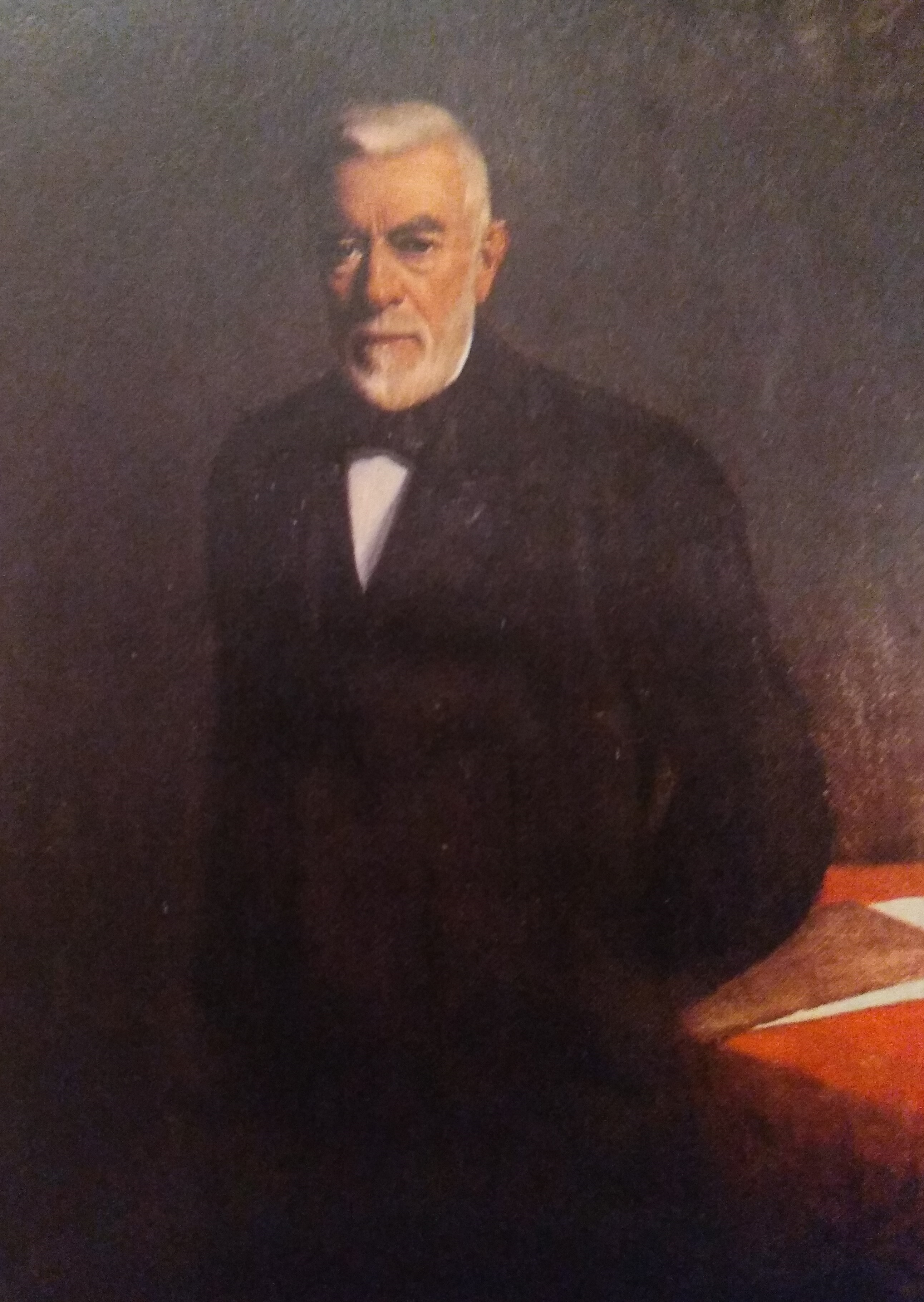 Franz Hecker: Porträt von Johannes von Miquel, Öl auf Leinwand, 19. Jh.